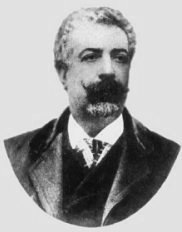 Alberto Rondani